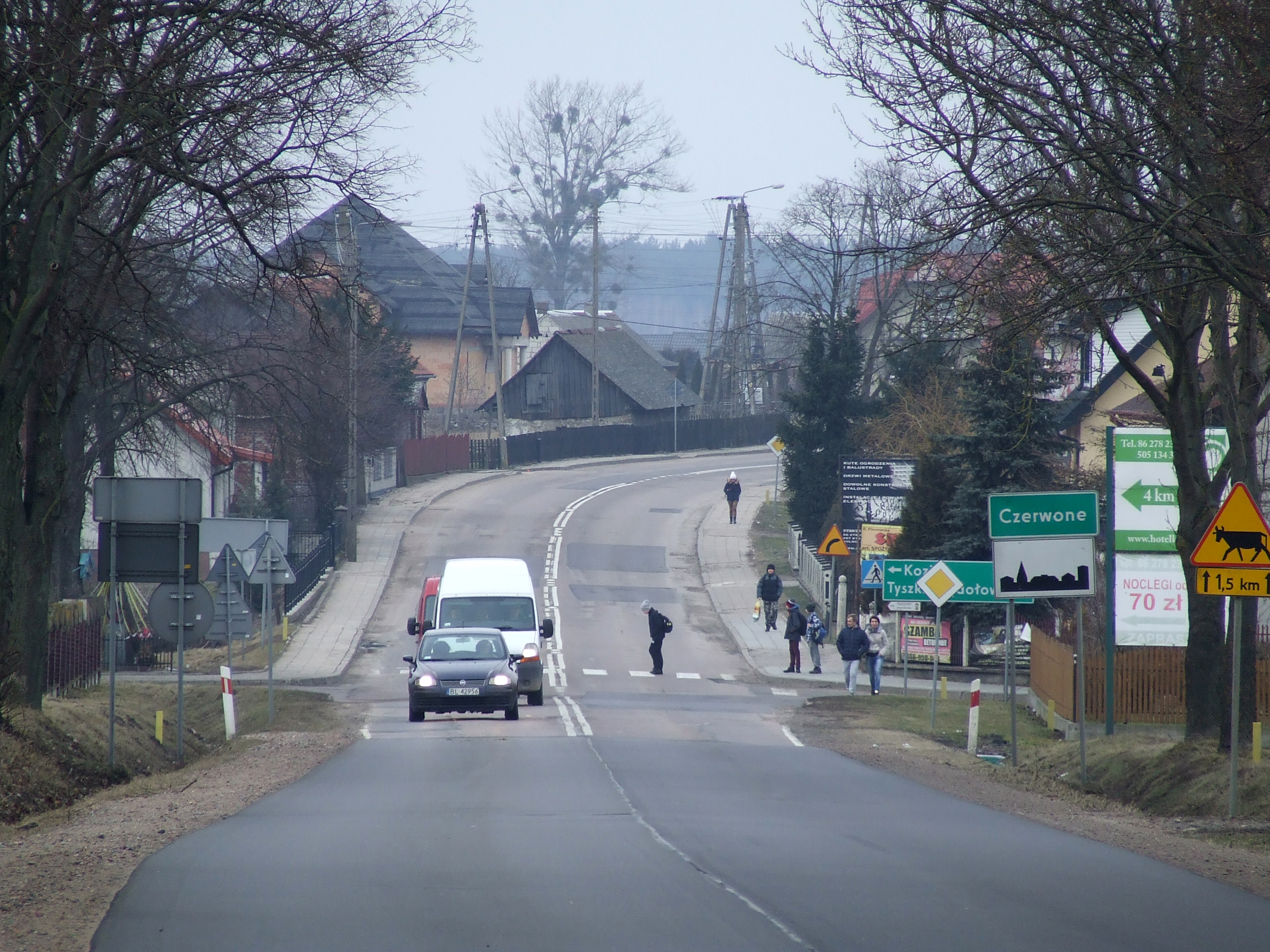 Czerwone - widok od strony południowej (droga krajowa nr. 63).